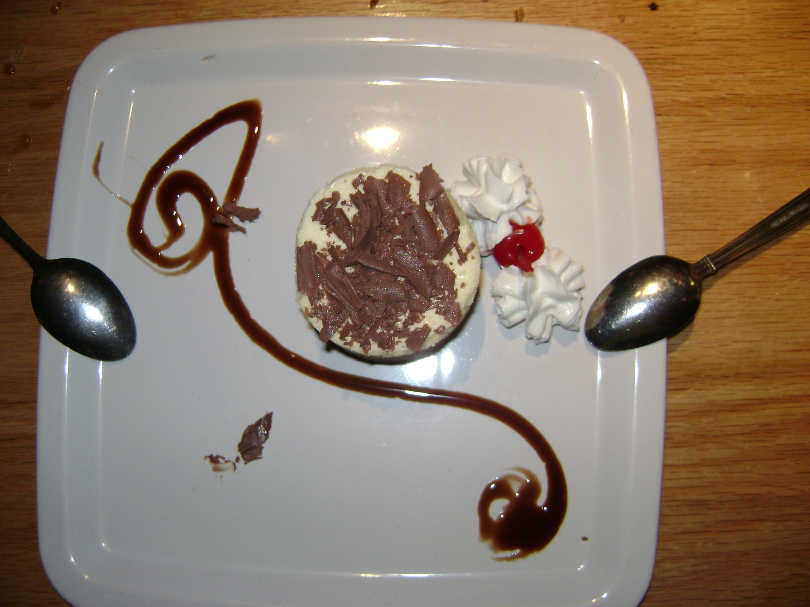 Mousse de chocolate y araza